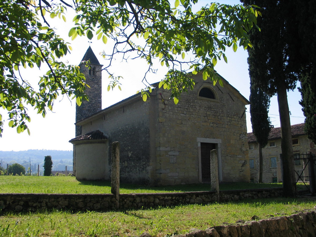 Chiesetta di San Marco a Pozzo